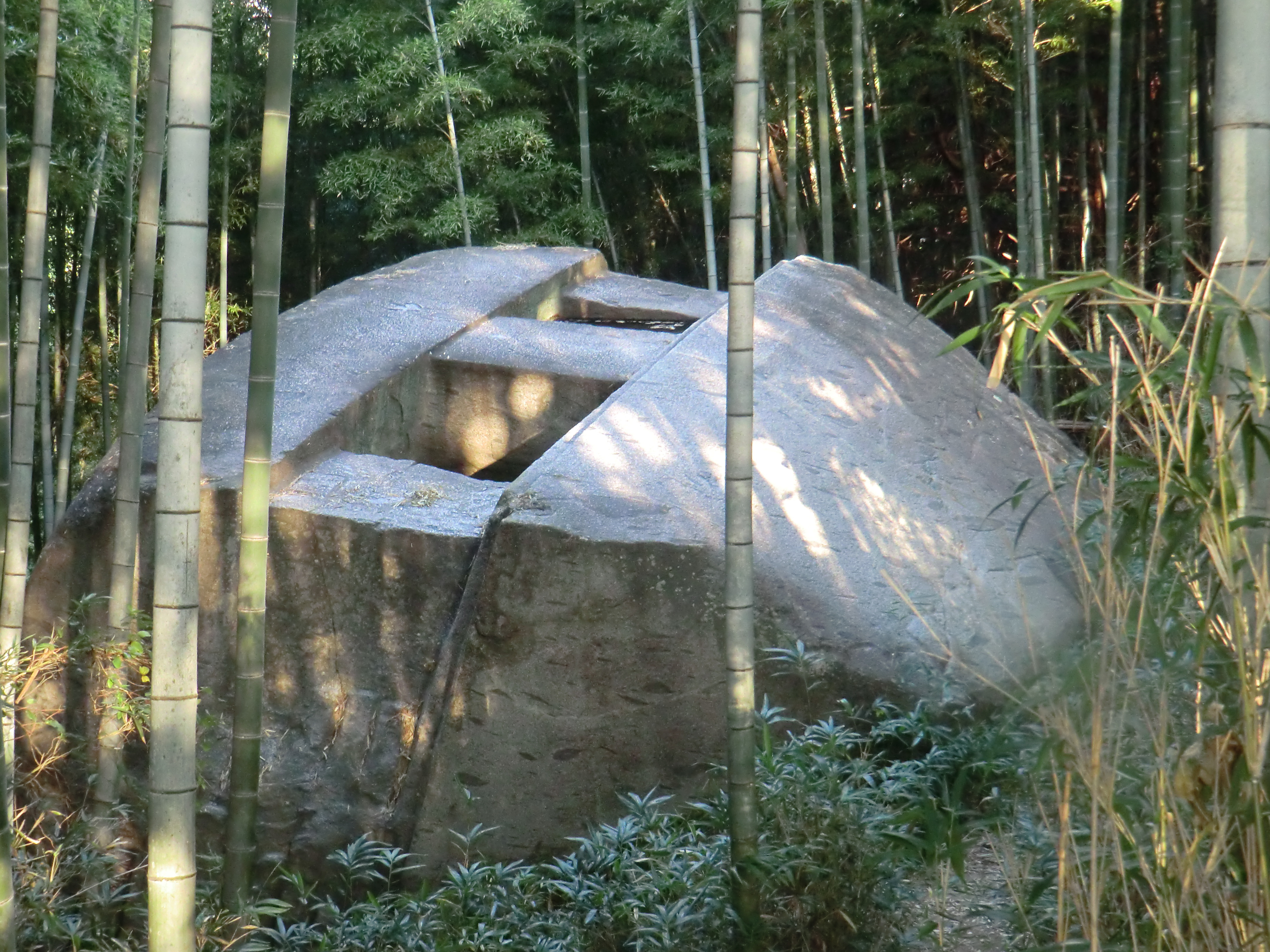 益田岩船 2013.10.14